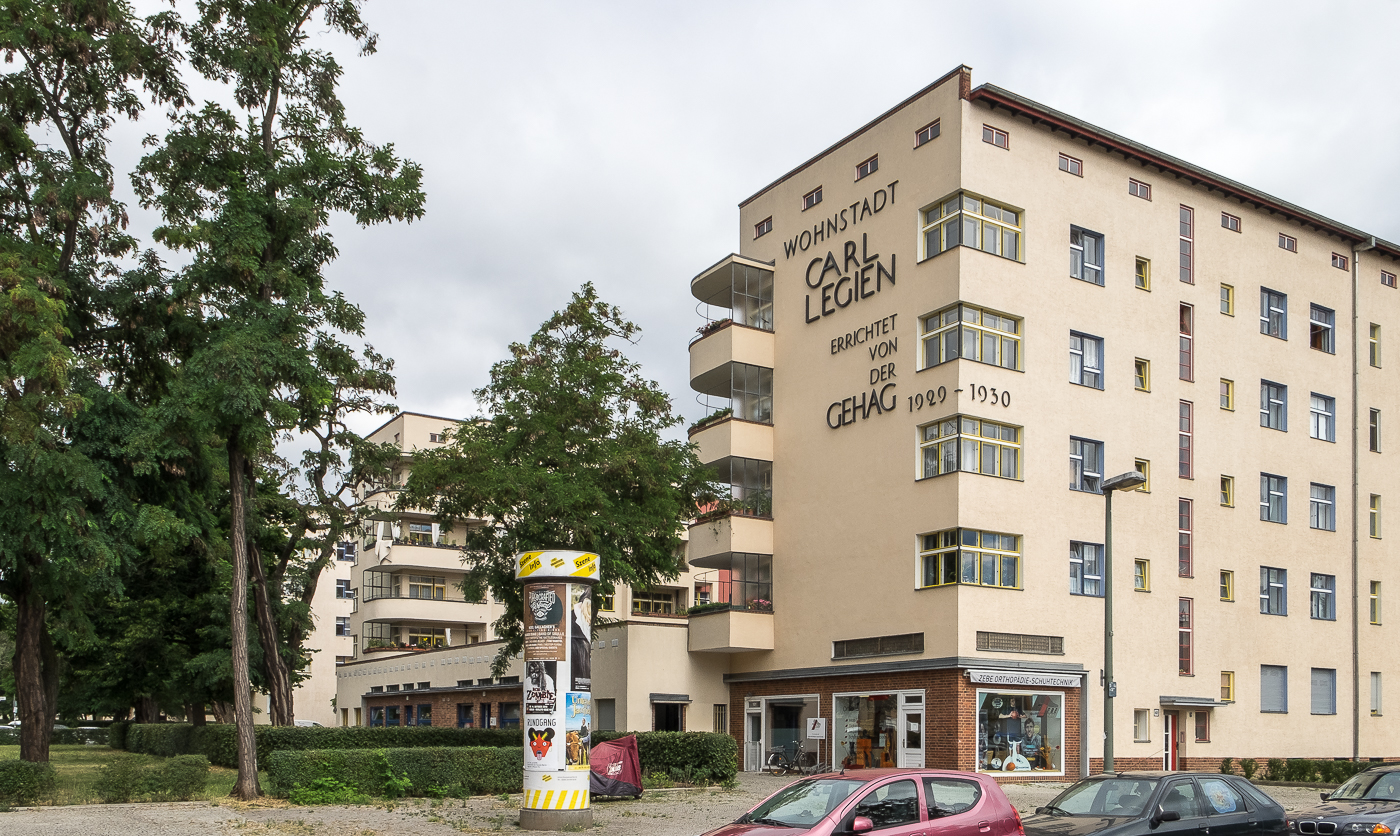 Riegel vor dem nord-östlichen roten Hof für Ladengeschäfte der Carl-Legien-Siedlung